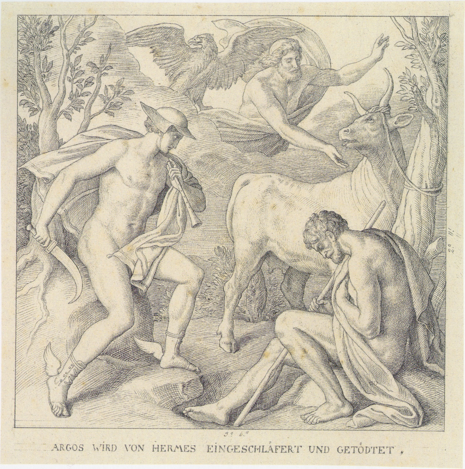 Argos wird von Hermes eingeschläfert und getötet, Fresko-Entwurf zu den Hymnen des Homer